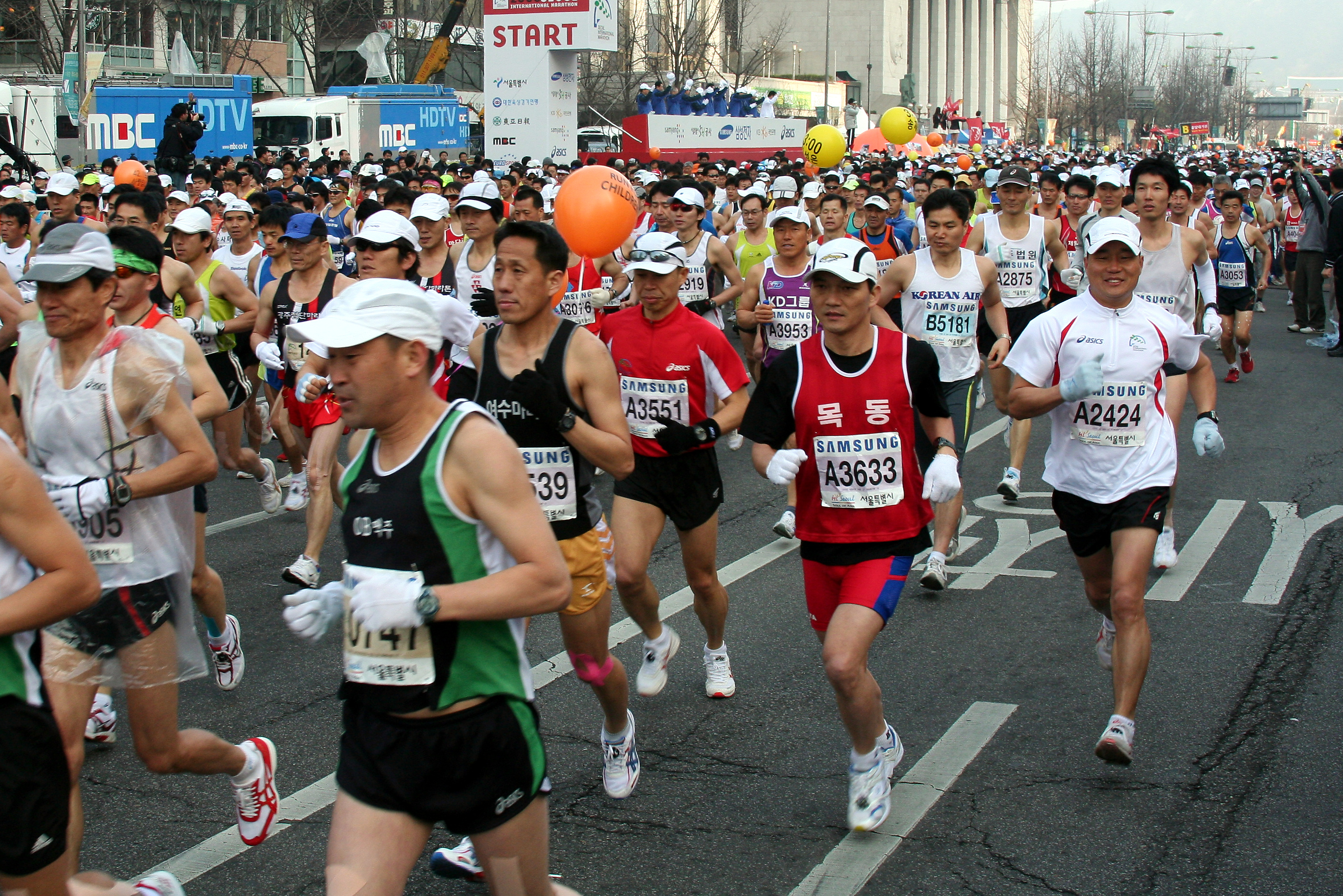 start line